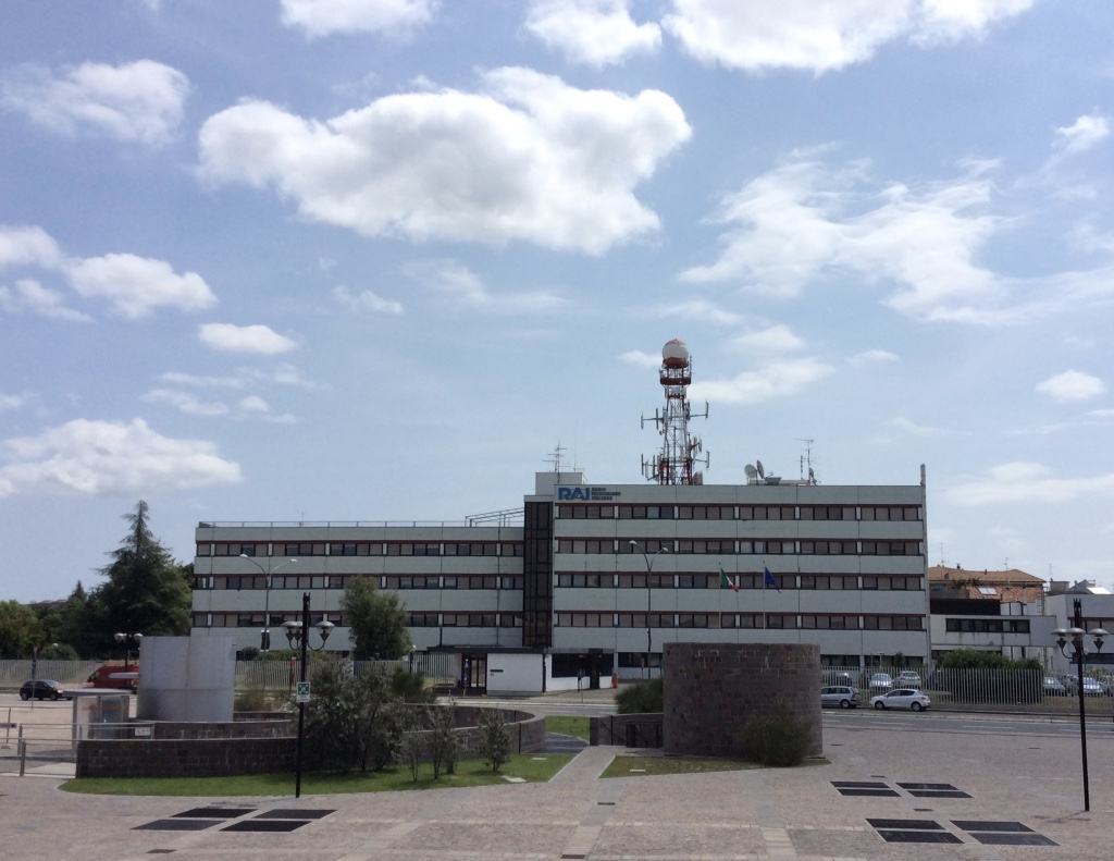 Radiotelevisione Italiana (RAI) sede di Bologna